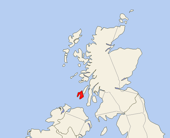 艾拉島位置圖，本圖片由上傳者User:SElephant本人手工描圖後經影像軟體處理而成。